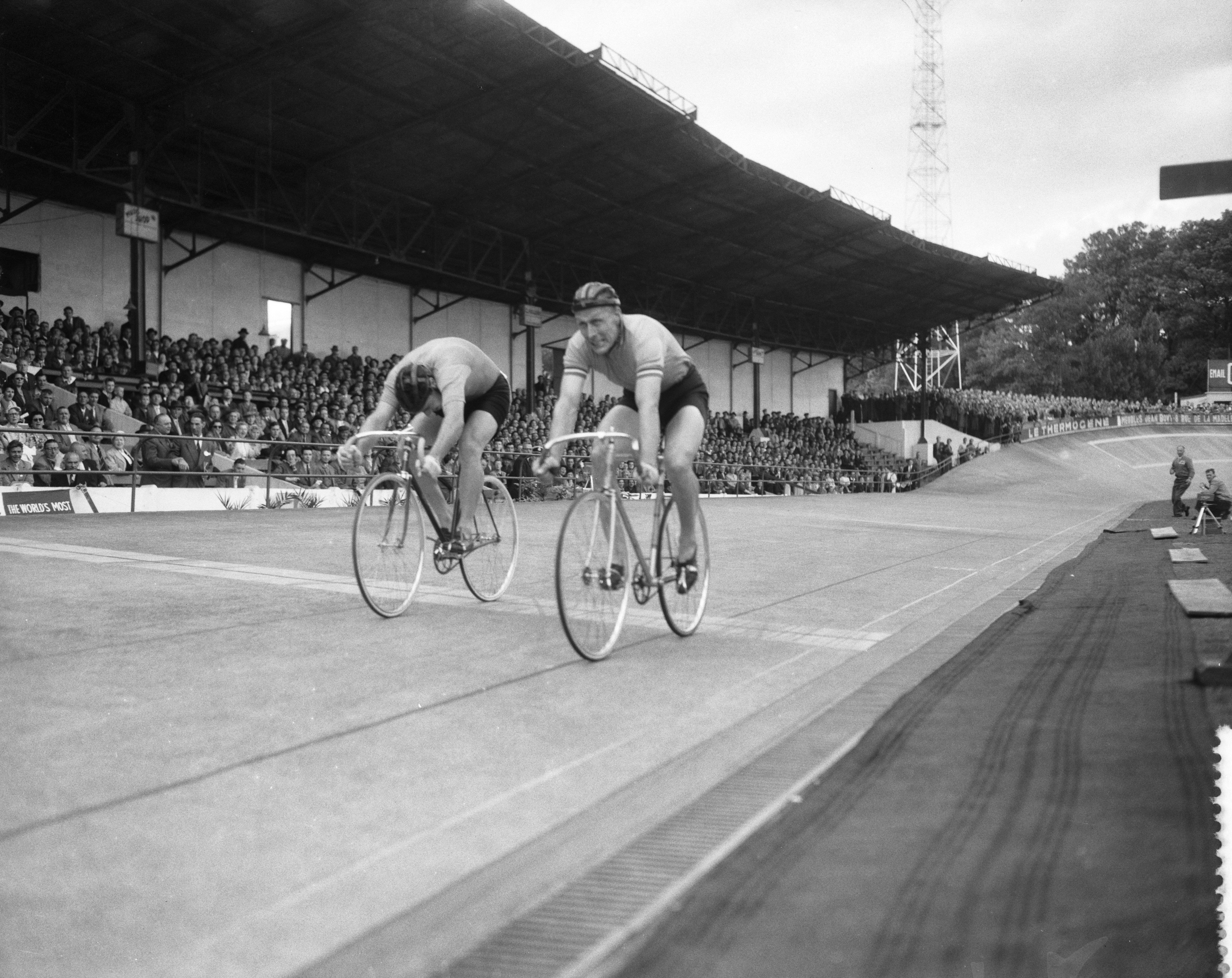 Collectie / Archief : Fotocollectie Anefo Reportage / Serie : [ onbekend ] Beschrijving : Wereldkampioenschappen wielrennen te Luik (Roucourt). Sprint Jan Derksen en Maspes (Italie) bij finish Datum : 11 augustus 1957 Locatie : Luik Trefwoorden : baan, sport, wielrennen Persoonsnaam : Derksen Jan, Maspes Antonio Fotograaf : Pot, Harry / Anefo Auteursrechthebbende : Nationaal Archief Materiaalsoort : Negatief (zwart/wit) Nummer archiefinventaris : bekijk toegang 2.24.01.04 Bestanddeelnummer : 908-8531